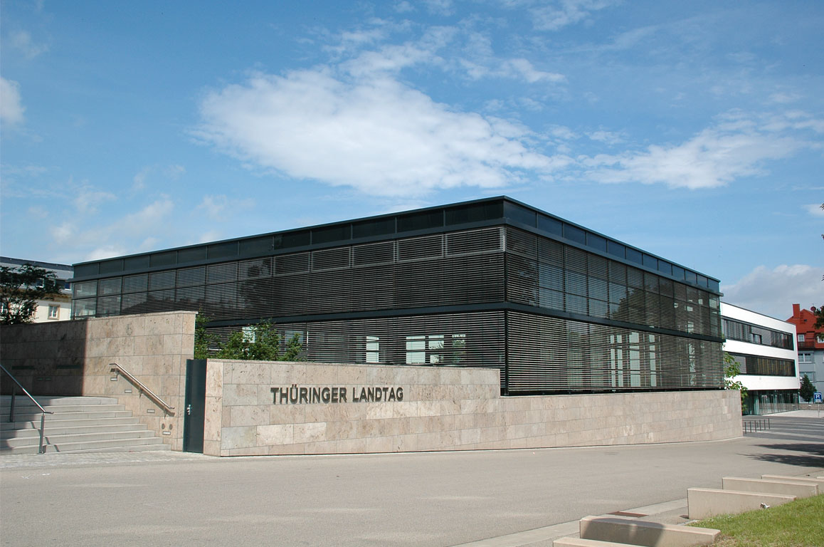 Plenarsaal des Thüringer Landtags, in der Jürgen-Fuchs-Straße in Erfurt